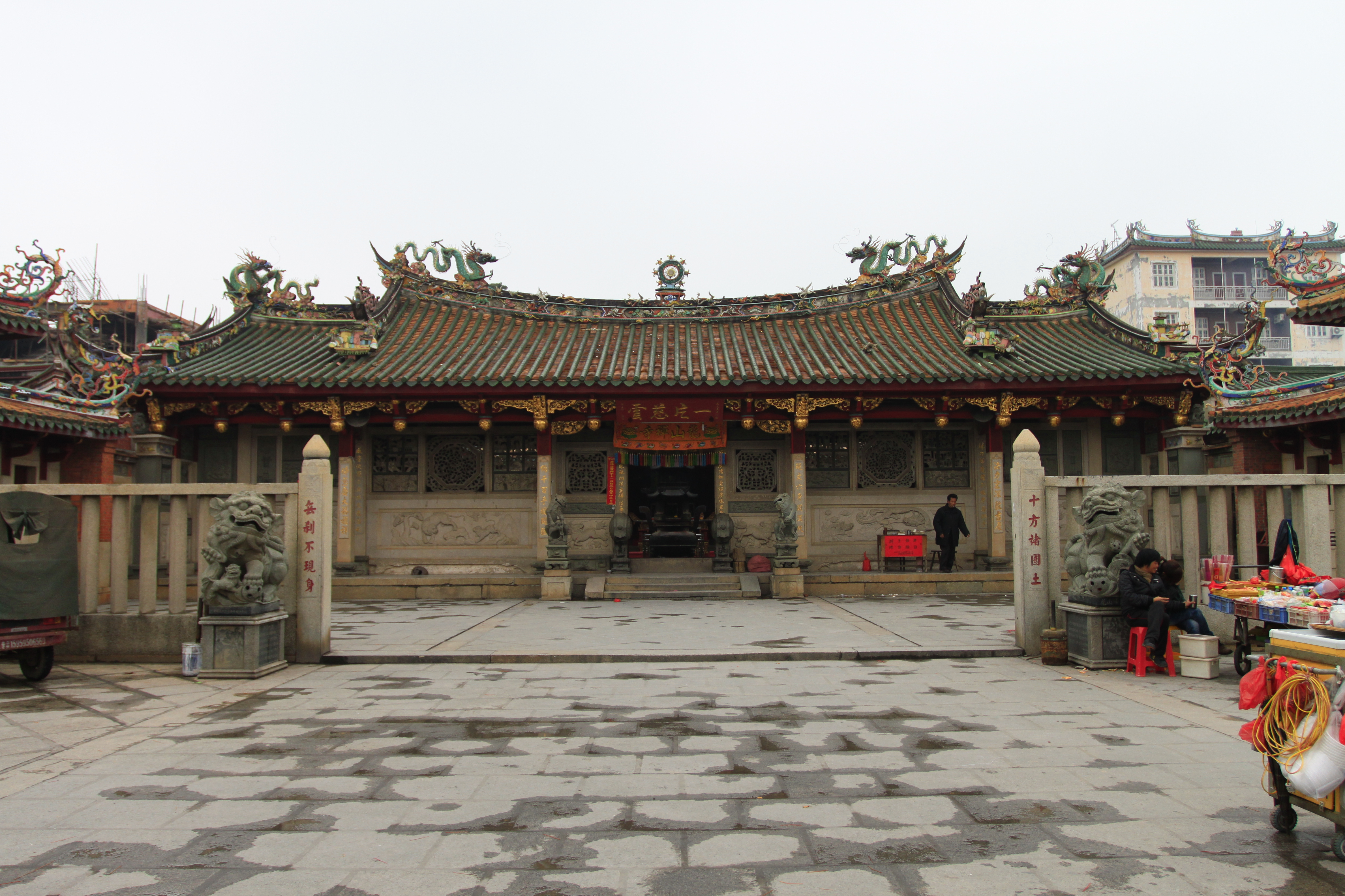 安海龙山寺，位于中国福建省晋江市安海镇。